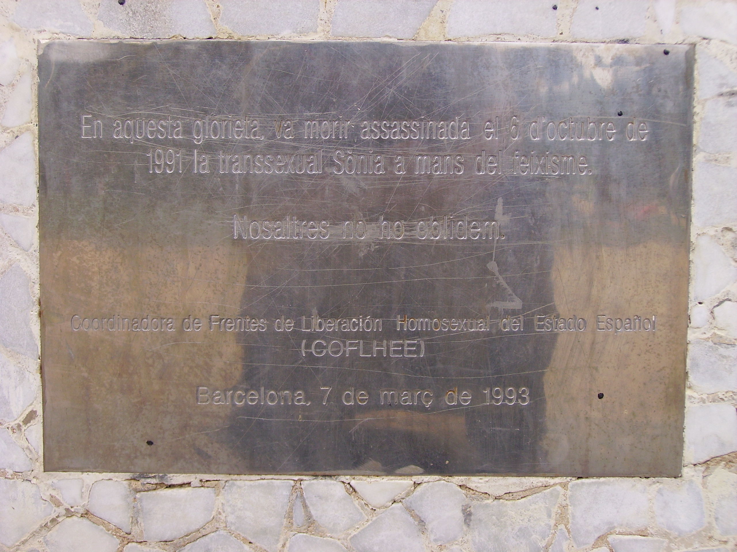 Placa de 1993 en memòria de la transsexual Sònia, en el lloc que va ser assassinada el 6 d'octubre de 1991 al Parc de la Ciutadella, Barcelona, Catalunya.